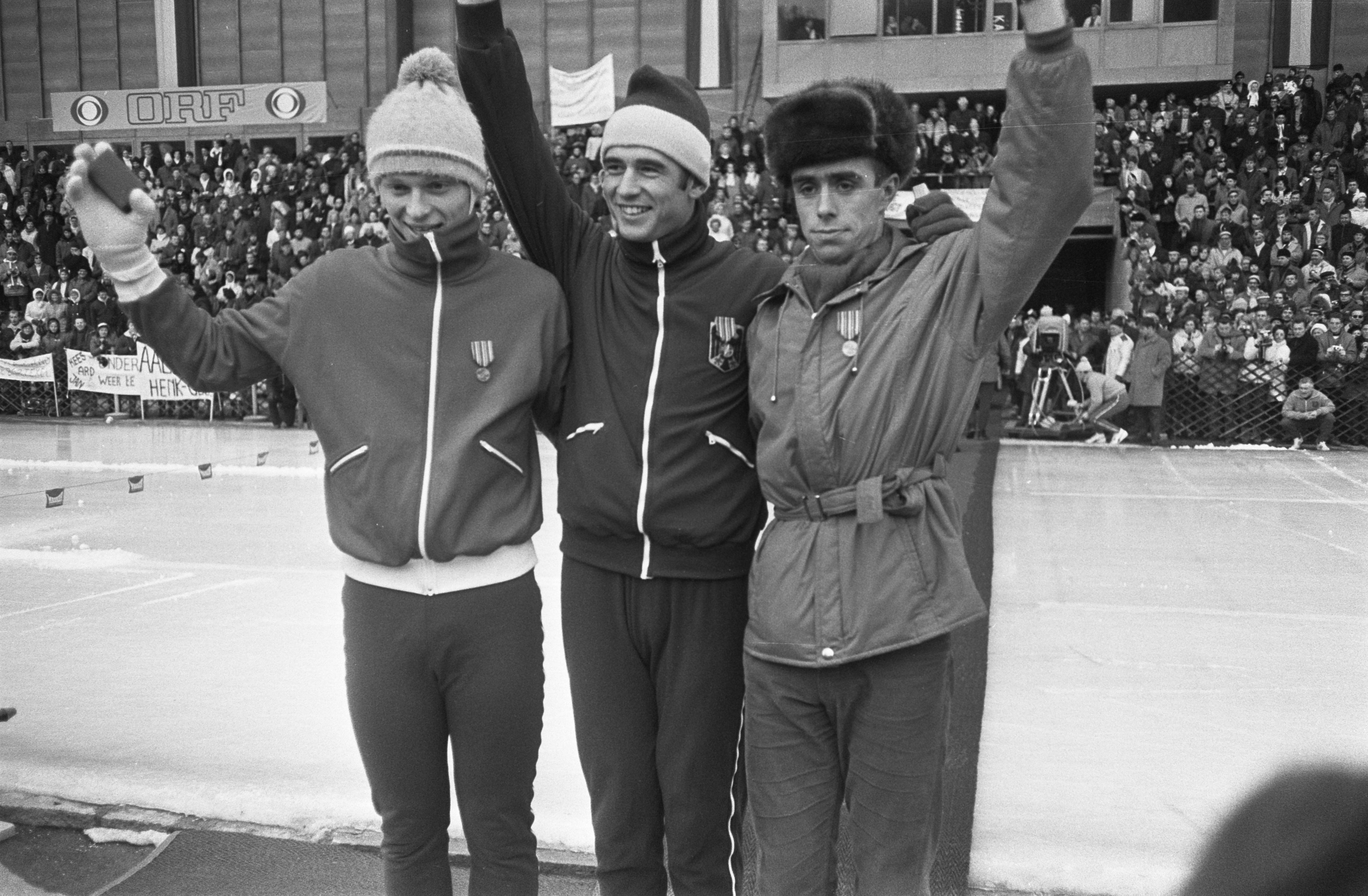 Collectie / Archief : Fotocollectie Anefo Reportage / Serie : [ onbekend ] Beschrijving : Europese kampioenschappen Schaatsen te Innsbruck. Huldiging 500m. Gronvold (3e), Keller (1e), Fornaess (2e) Datum : 24 januari 1970 Locatie : Innsbruck, Oostenrijk Trefwoorden : KAMPIOENSCHAPPEN, SCHAATSEN, huldigingen, sport Fotograaf : Koch, Eric / Anefo Auteursrechthebbende : Nationaal Archief Materiaalsoort : Negatief (zwart/wit) Nummer archiefinventaris : bekijk toegang 2.24.01.05 Bestanddeelnummer : 923-1887